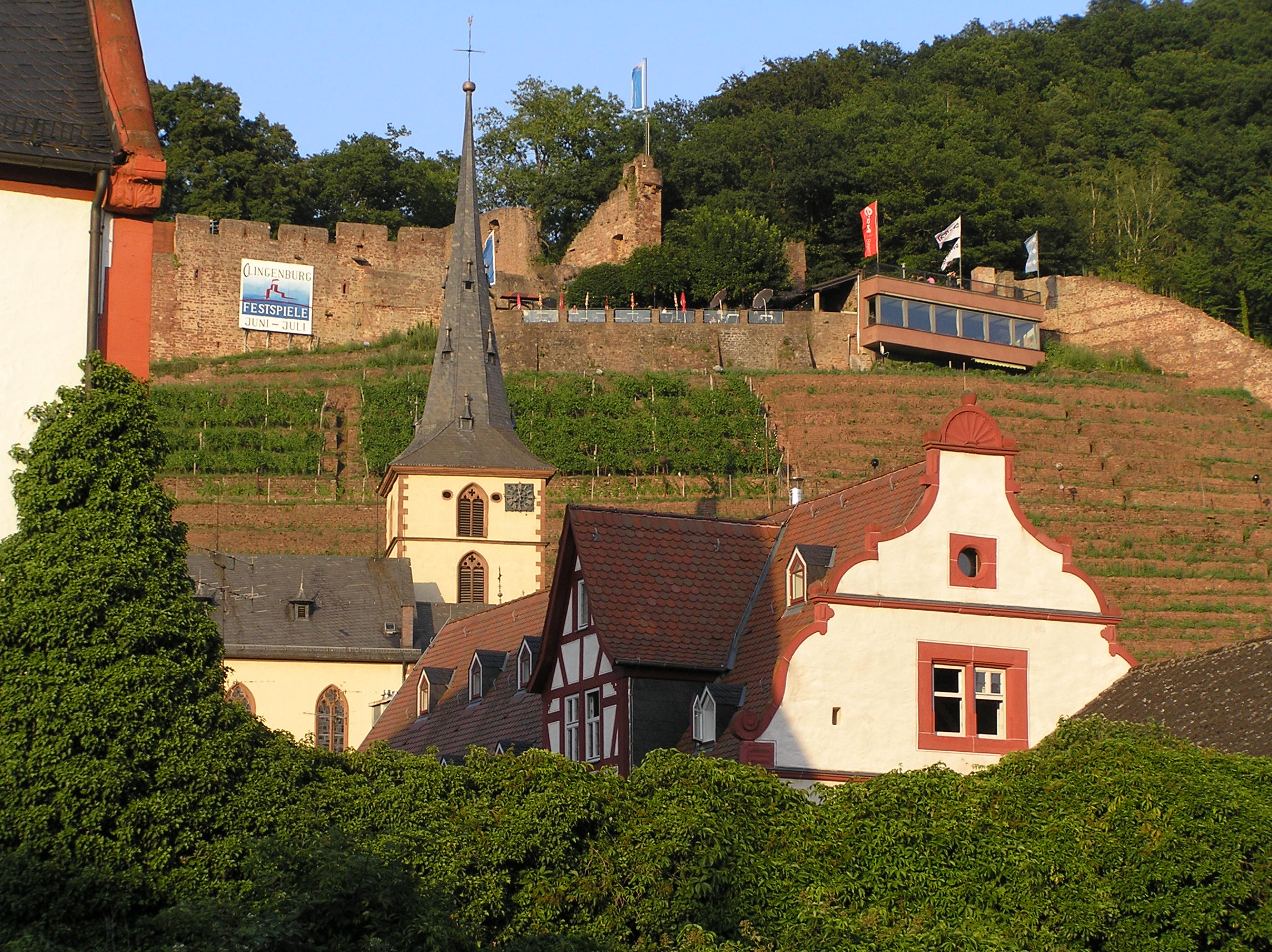 Die Clingenburg, die Pfarrkirche und das Torhaus des Stadtschlosses in Klingenberg